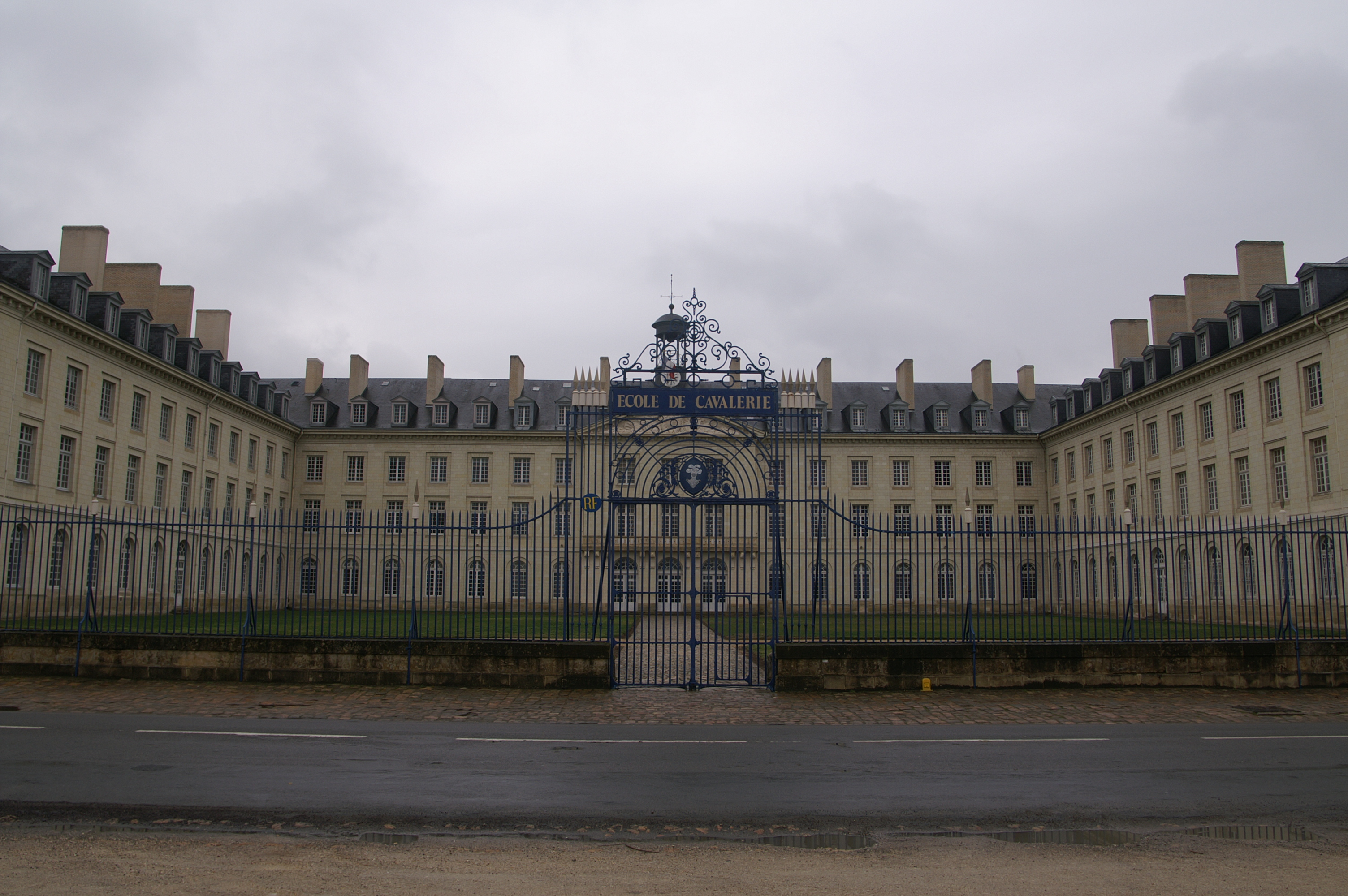 École de cavalerie de Saumur : la caserne.